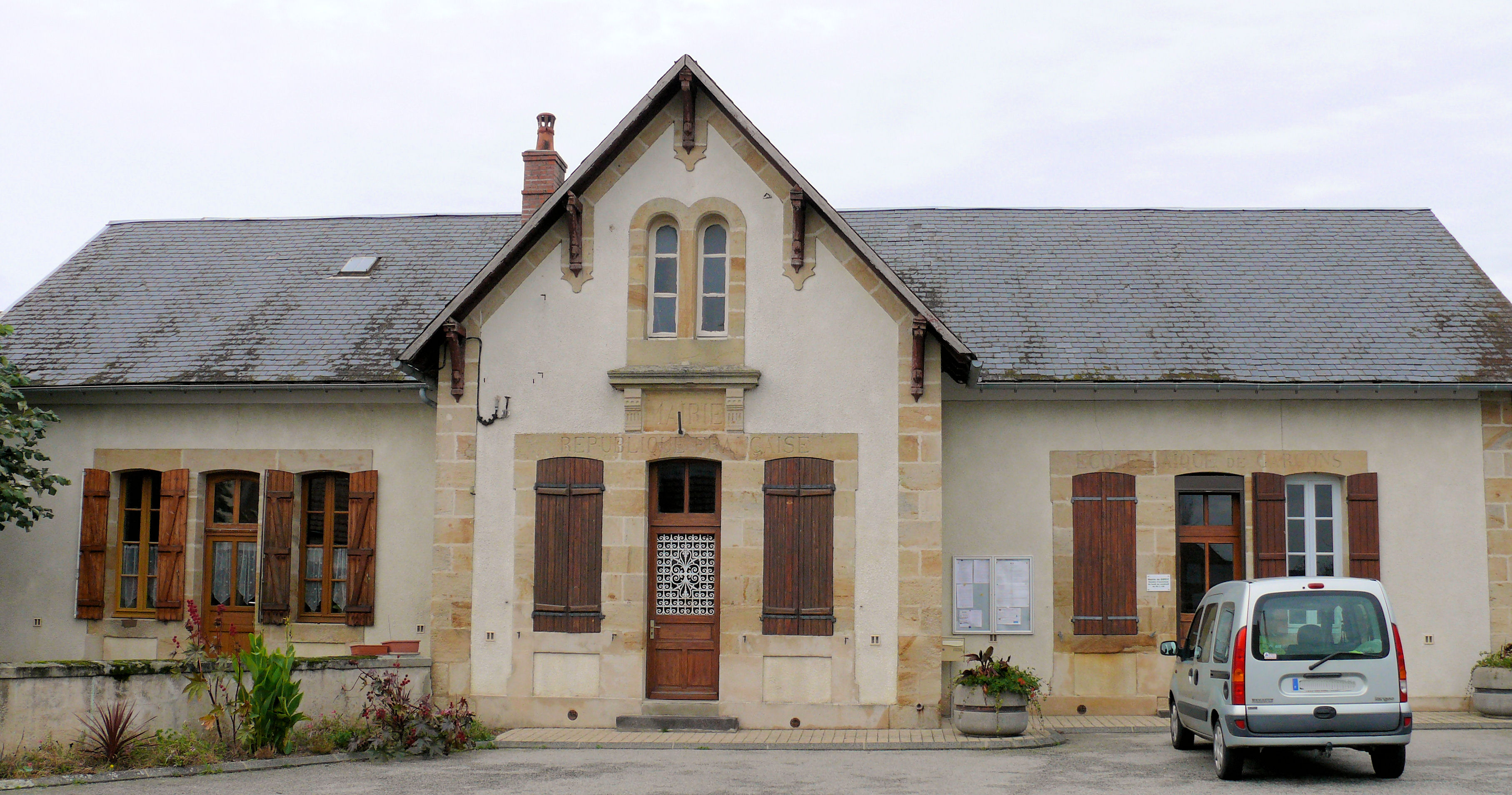 Gipcy - Mairie